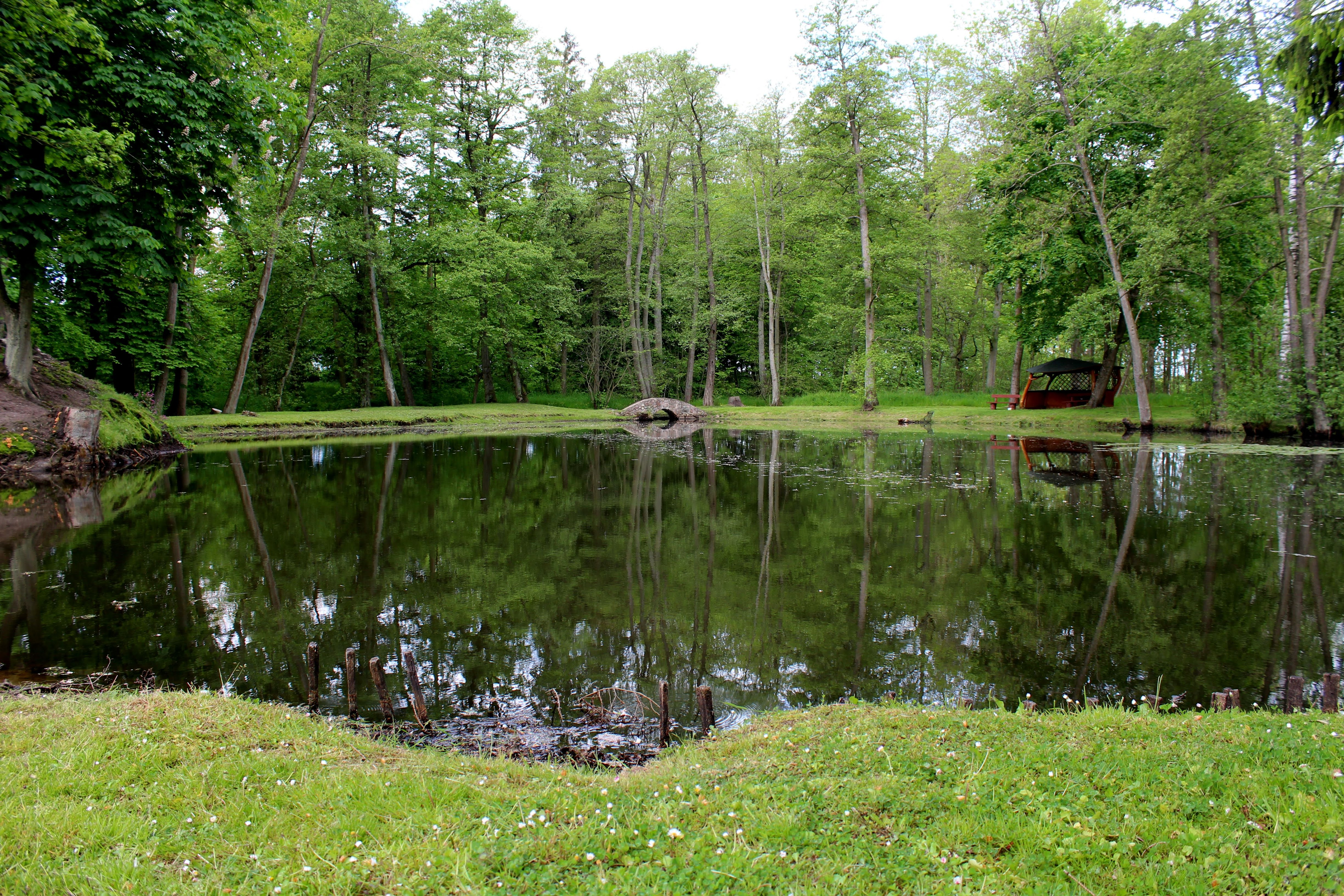 Staw przy dworze w Giezkowie